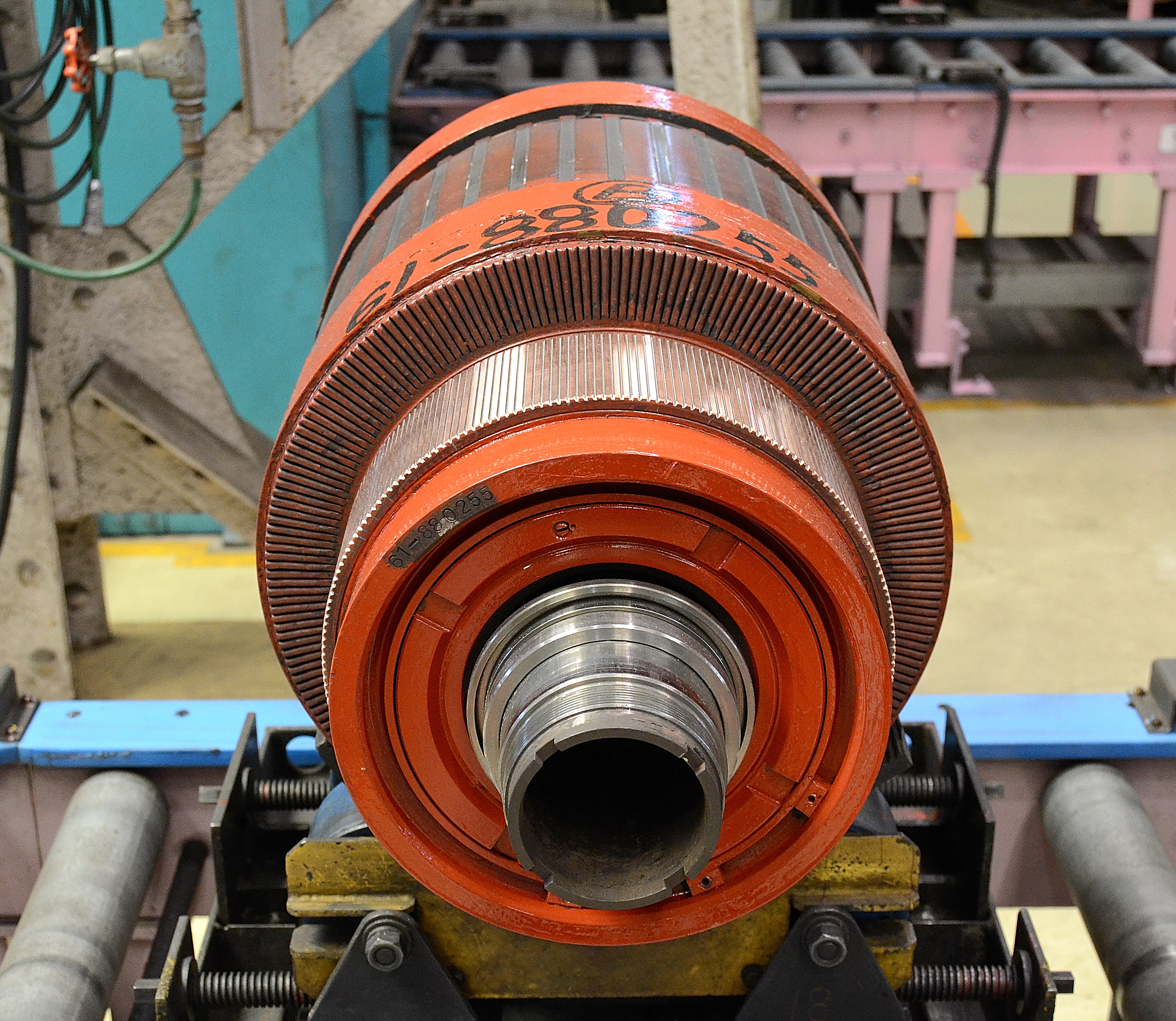 MT61形直巻整流子電動機の回転子、手前にあるのは整流子。（2014年のJRおおみやふれあい鉄道フェアーでの工場開放にて撮影）